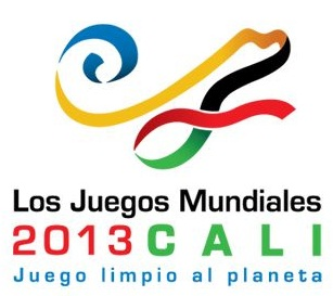 Logo dos Jogos Mundiais 2013